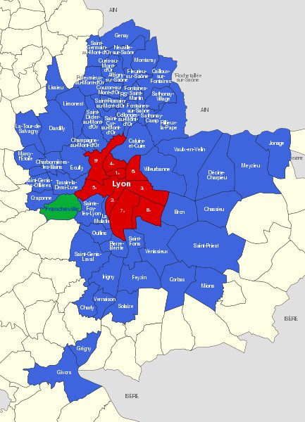 Communes du Grand Lyon, en vert Francheville